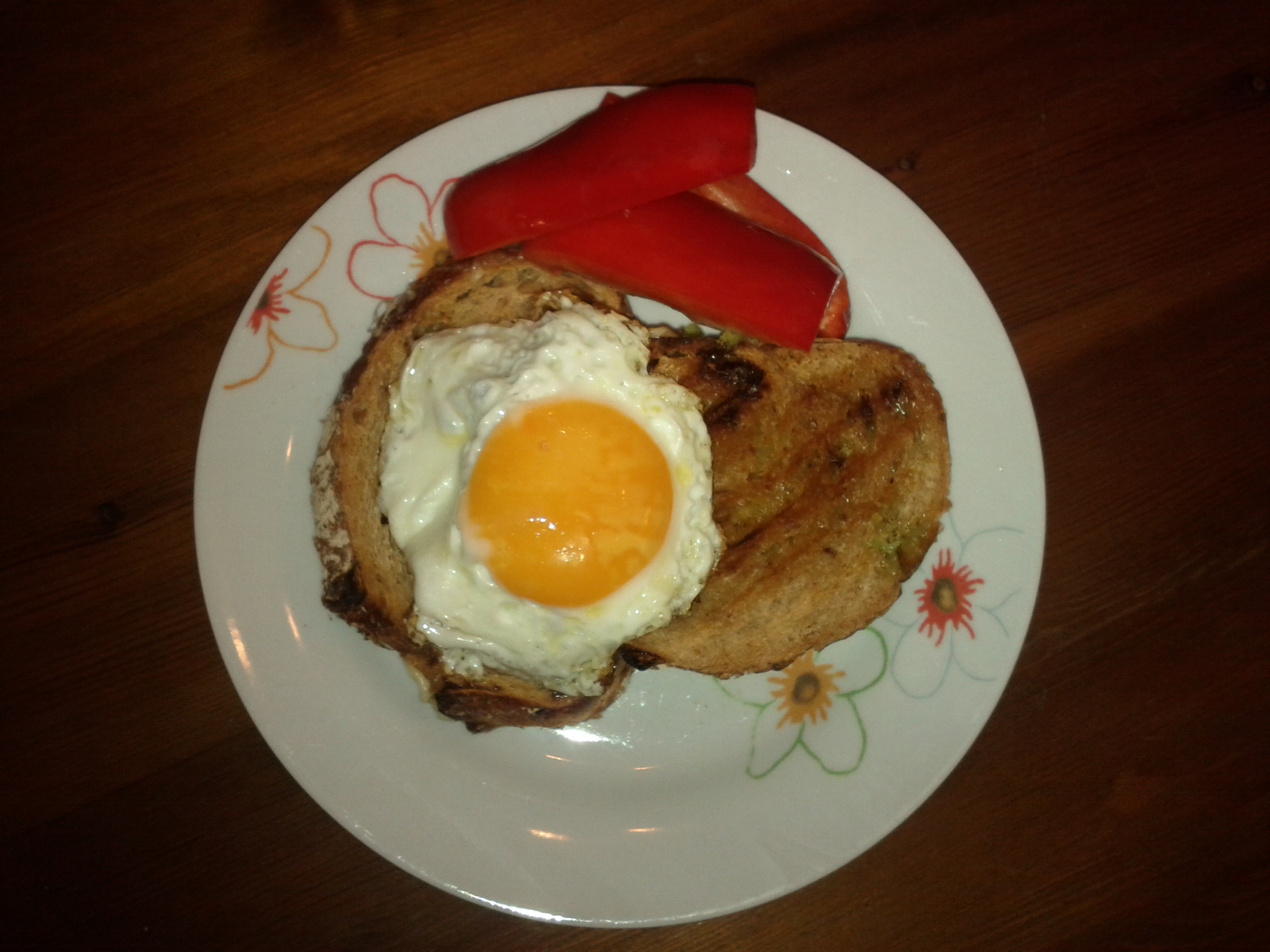 קרוק-מאדאם